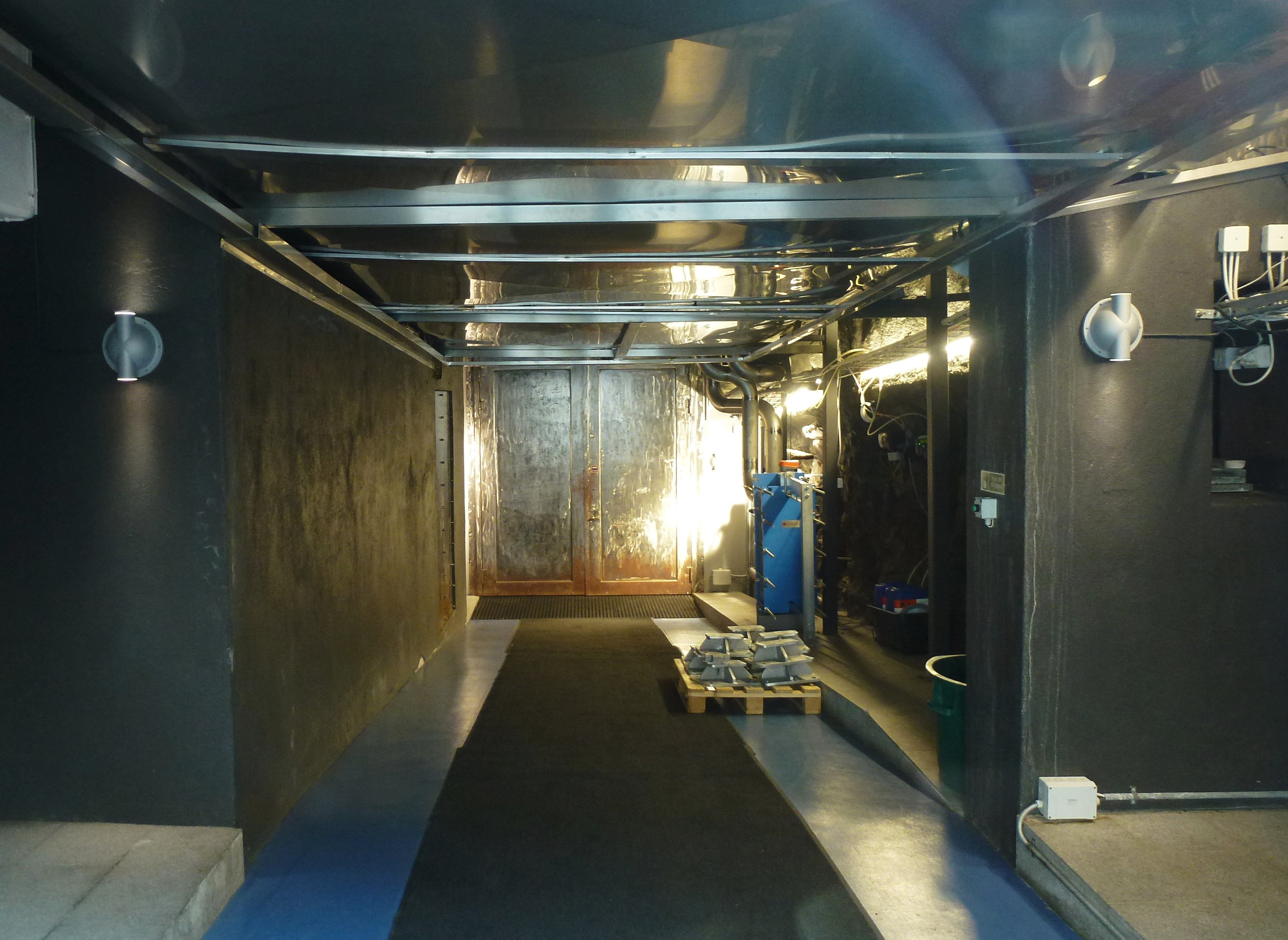 Pionen, tidigare skyddsrum och ledningscentral, numera plats för Bahnhofs datahall, arkitekt Albert France-Lanord